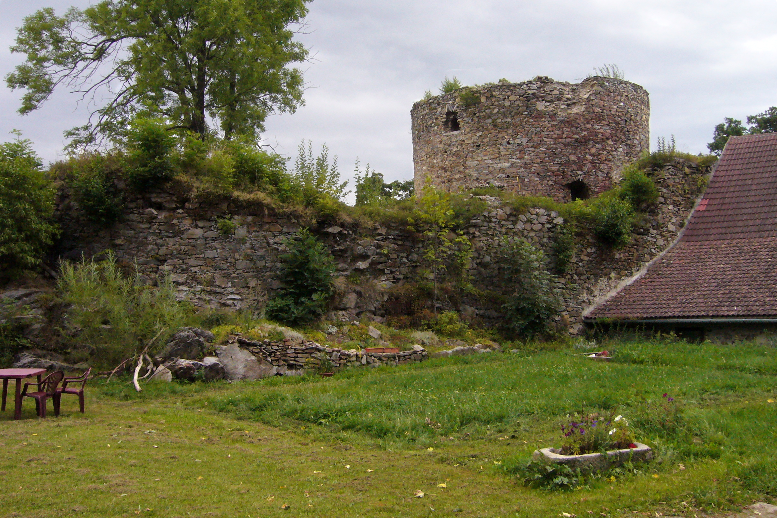 Předsunutá dělostřelecká bašta Haselburk